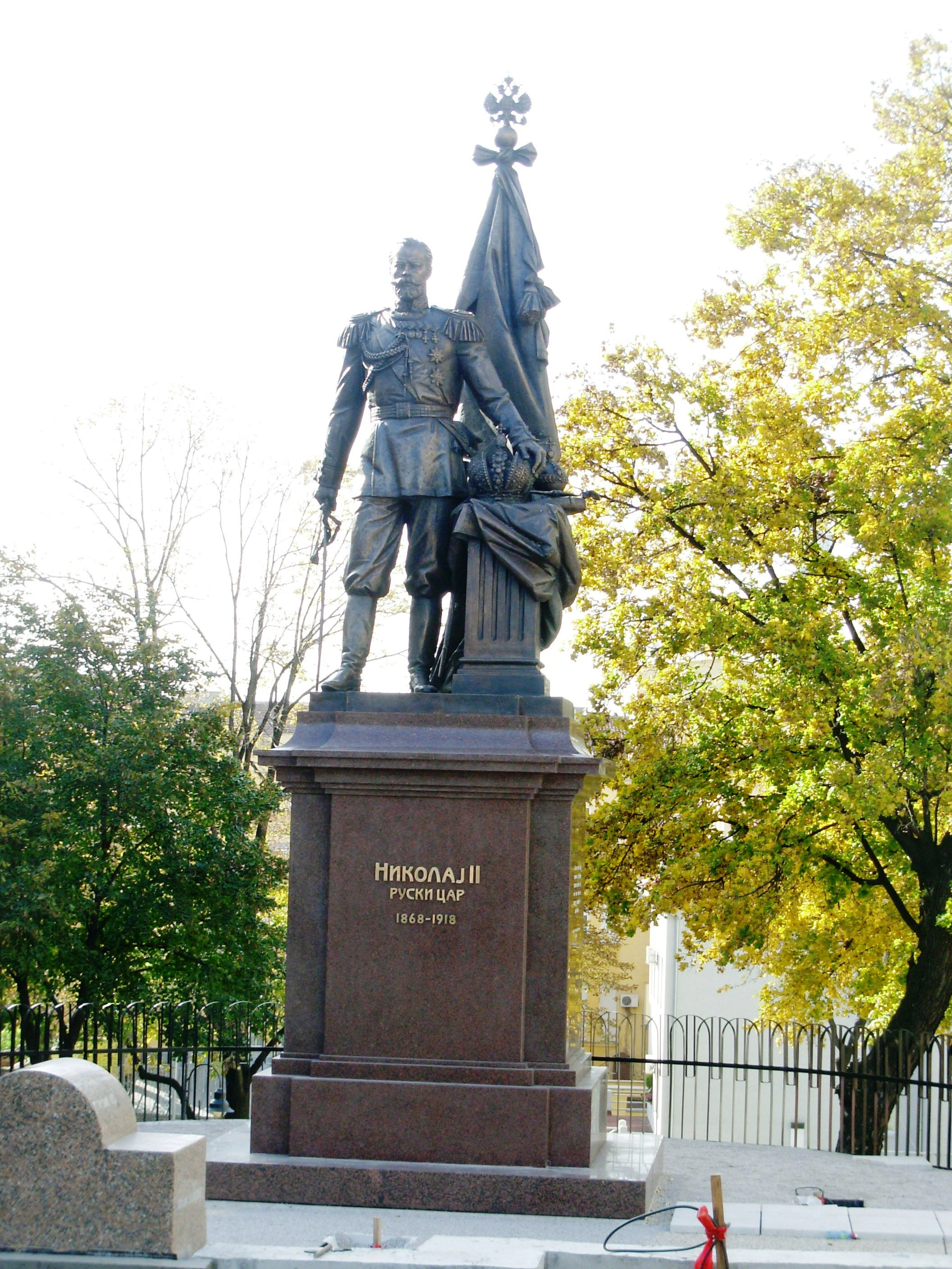 Spomeik Caru Nikolaju II u Beogradu. Slikao Goldfinger